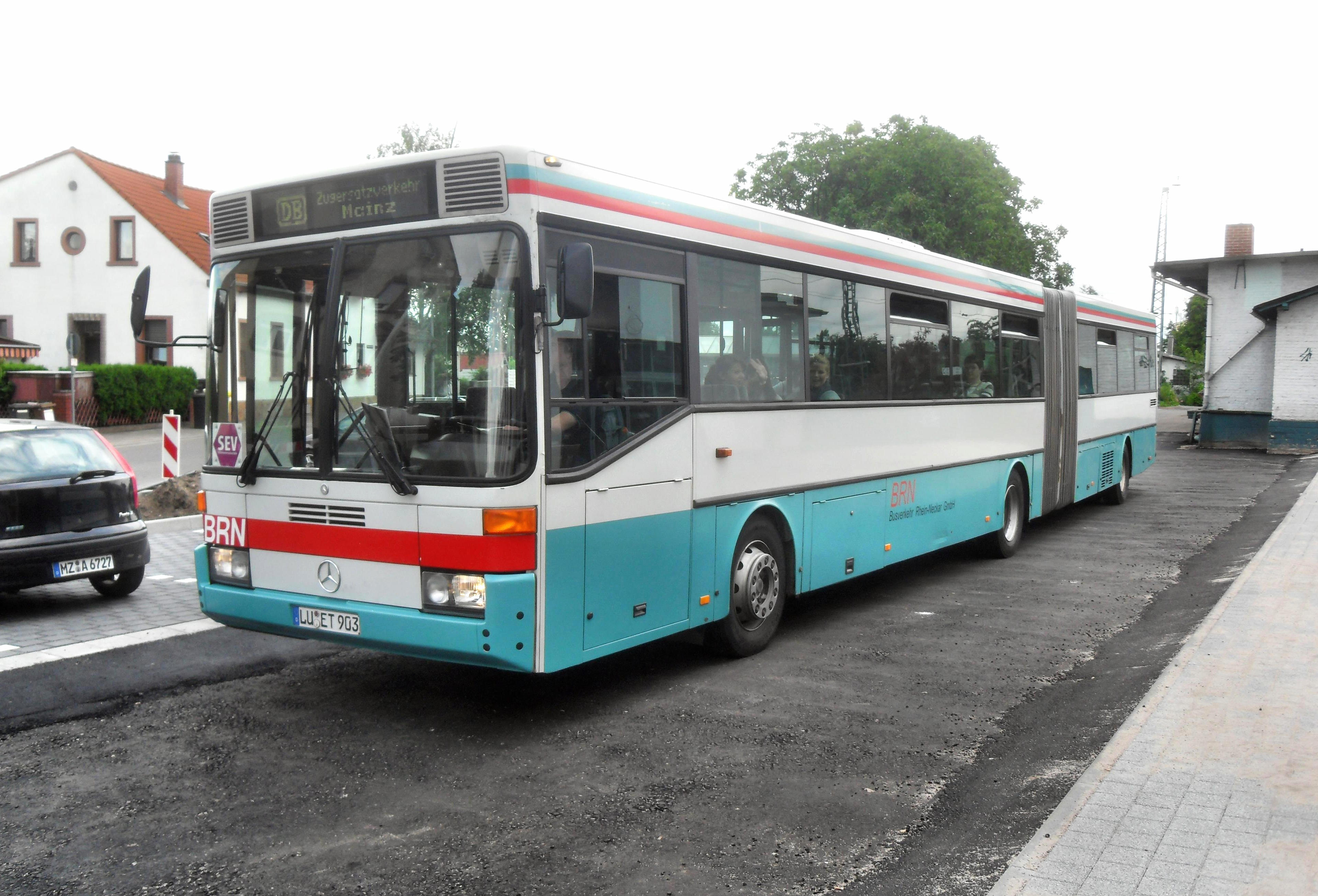 Der Guntersblumer Busbahnhof mit Mercedes-Benz-Bus in SchienenErsatzVerkehr-Einsatz auf dem Weg nach Mainz